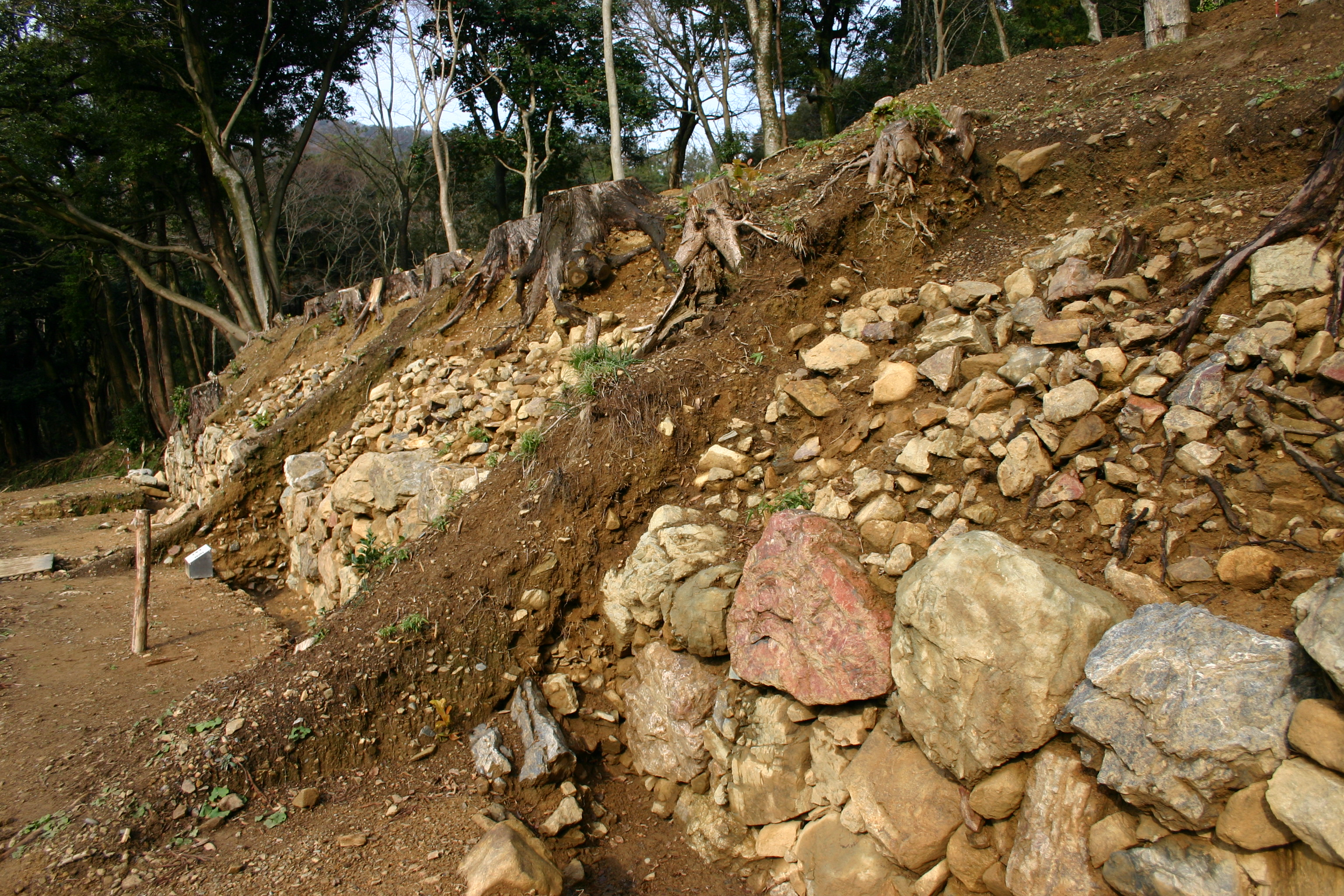 国吉城麓の居館の石垣。2004年の発掘調査時の写真。